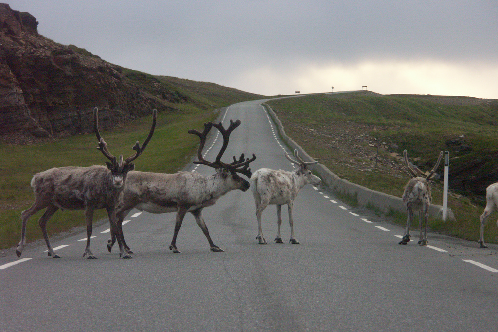 Magerøya